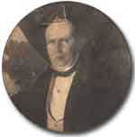 Miembro de la Casa de Lezica